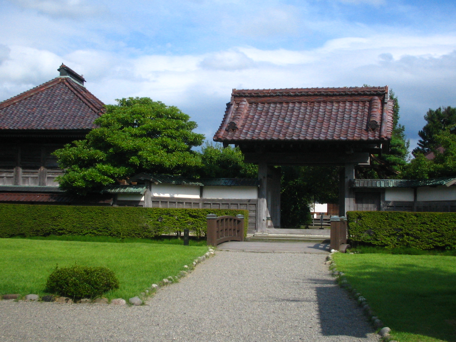 致道館表御門 山形県鶴岡市 2007年8月10日15:21 投稿者撮影 Chidōkan, Tsuruoka, Yamagata, Japan